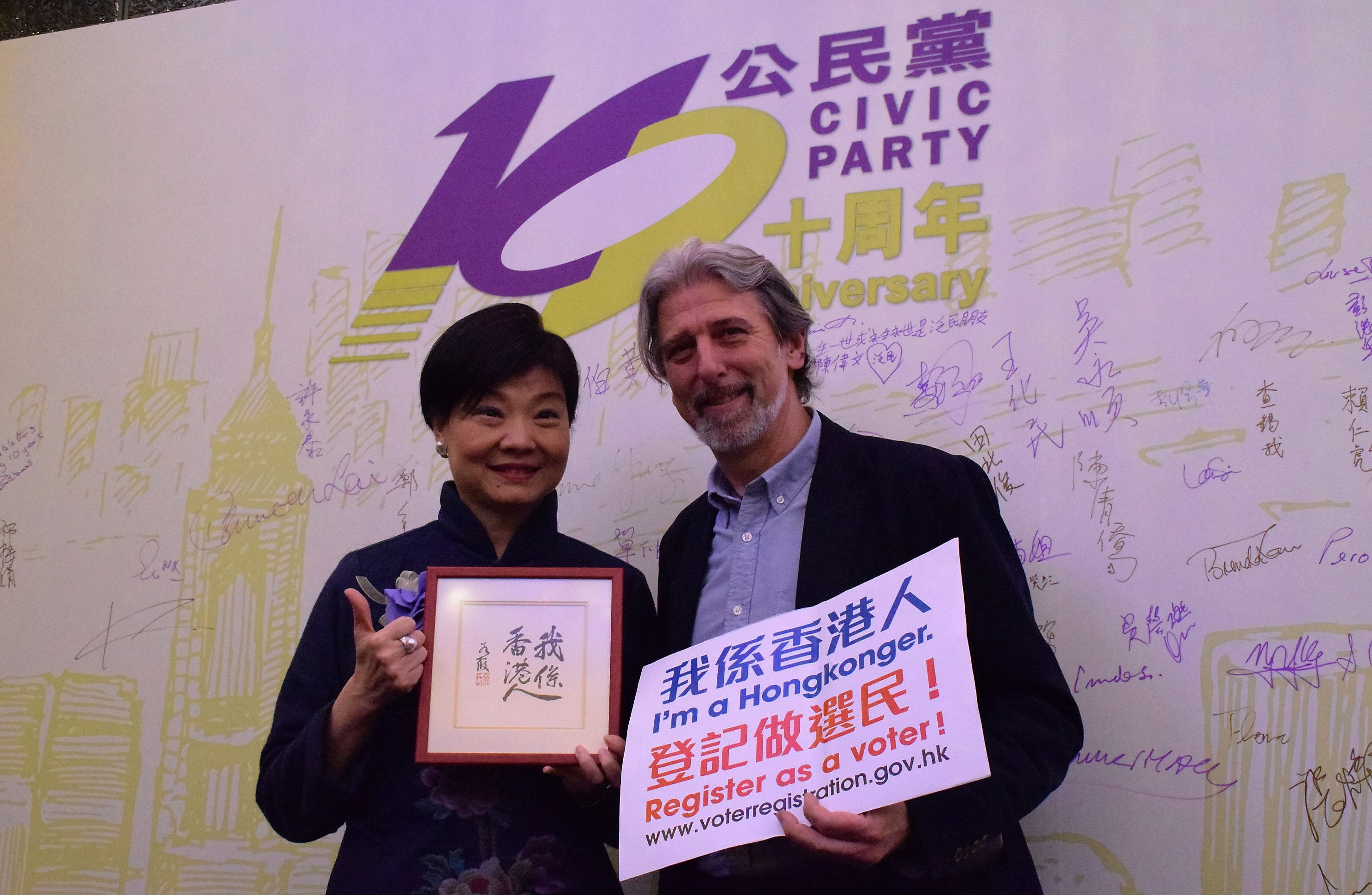 公民黨主席余若薇與公民黨前區議員司馬文